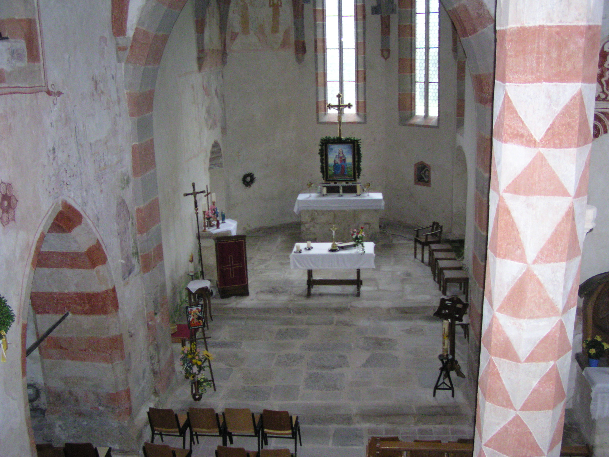 podzim 2011